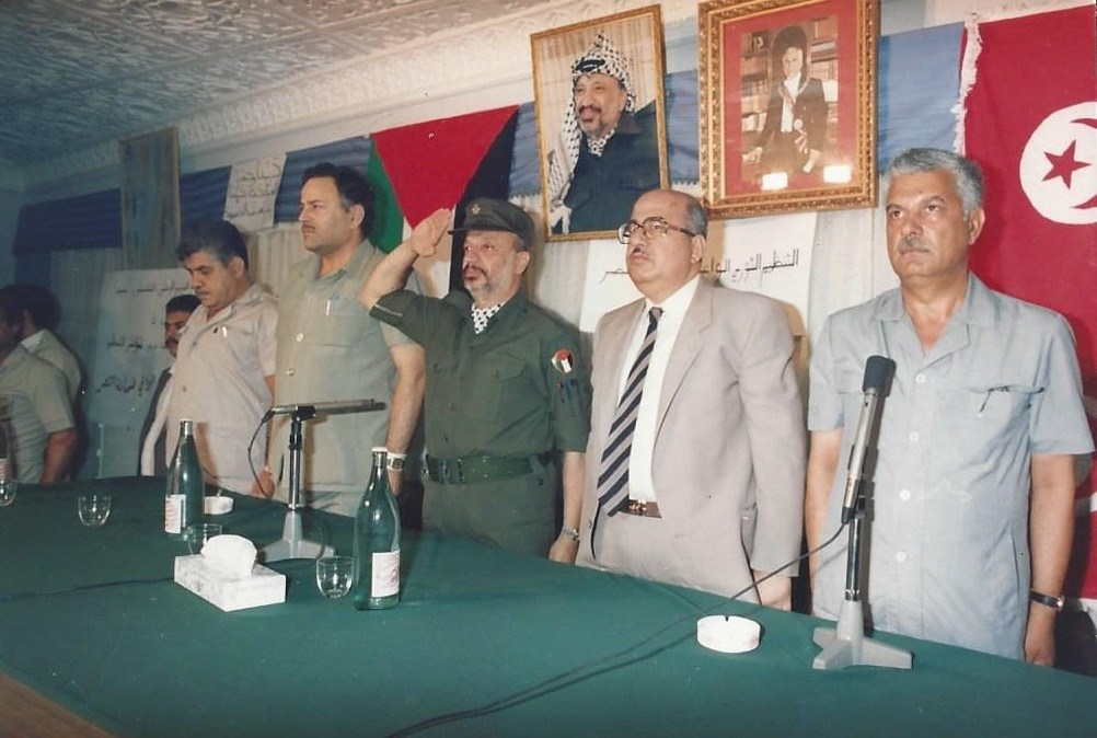 افتتاح دورة اعداد الكادر التنظيمي لحركة فتح في تونس 1978 بحضور الشهيد القائد ياسر عرفات ، ابو ماهر غنيم، سليم الوعنون و الرحل صحر حبش